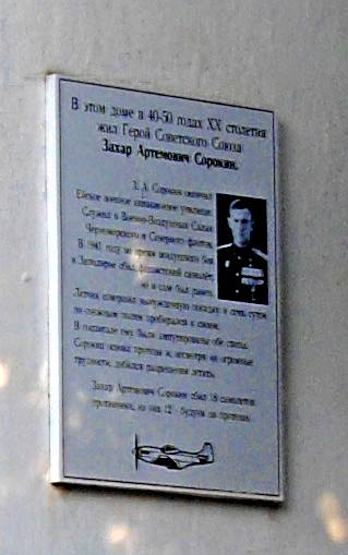 Мемориальная доска на доме, где жил Сорокин З.А. в 40-50-х годах.